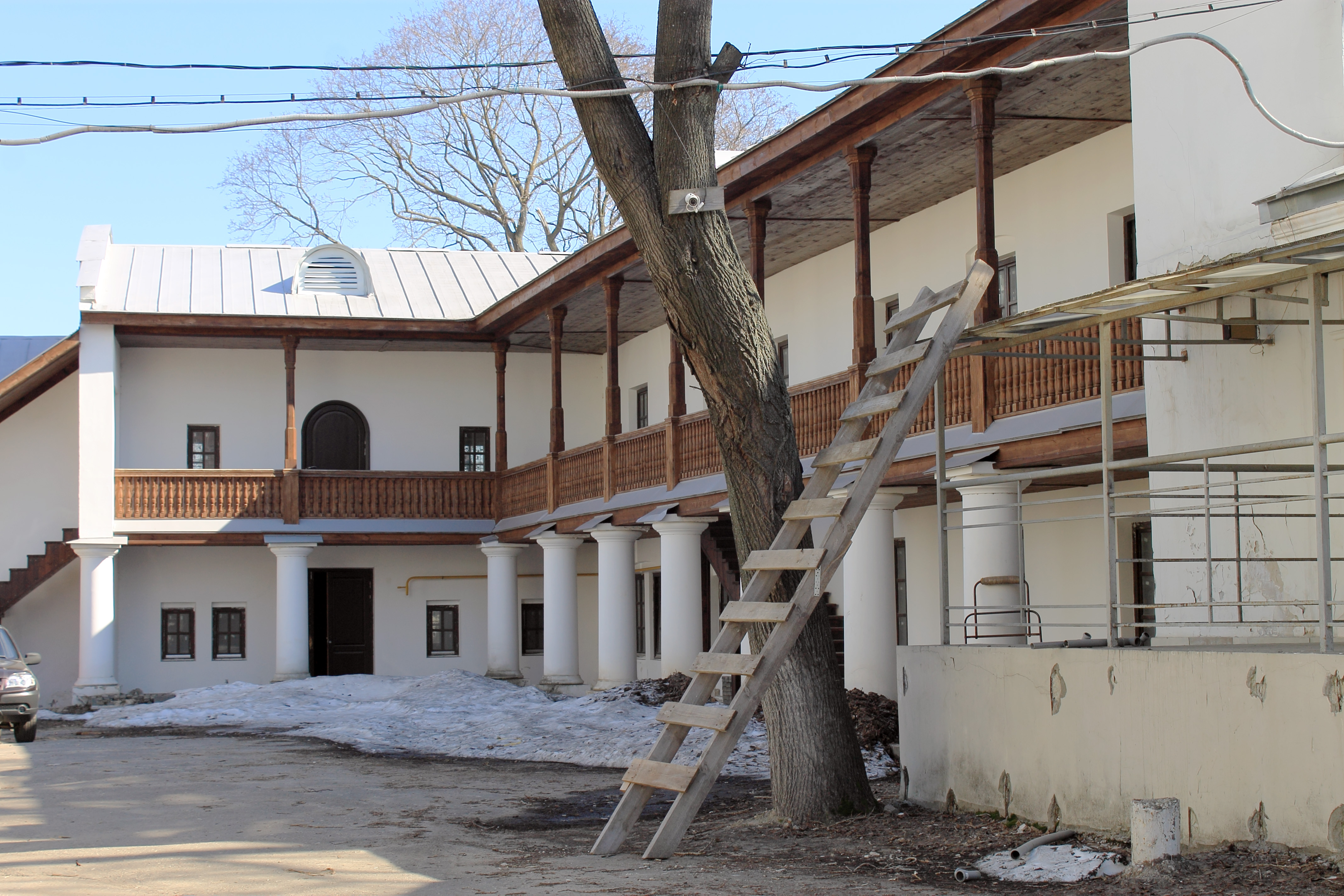 Хозяйственный корпус (три штуки): улица Ильинская, 56, Нижний Новгород, Нижегородская область